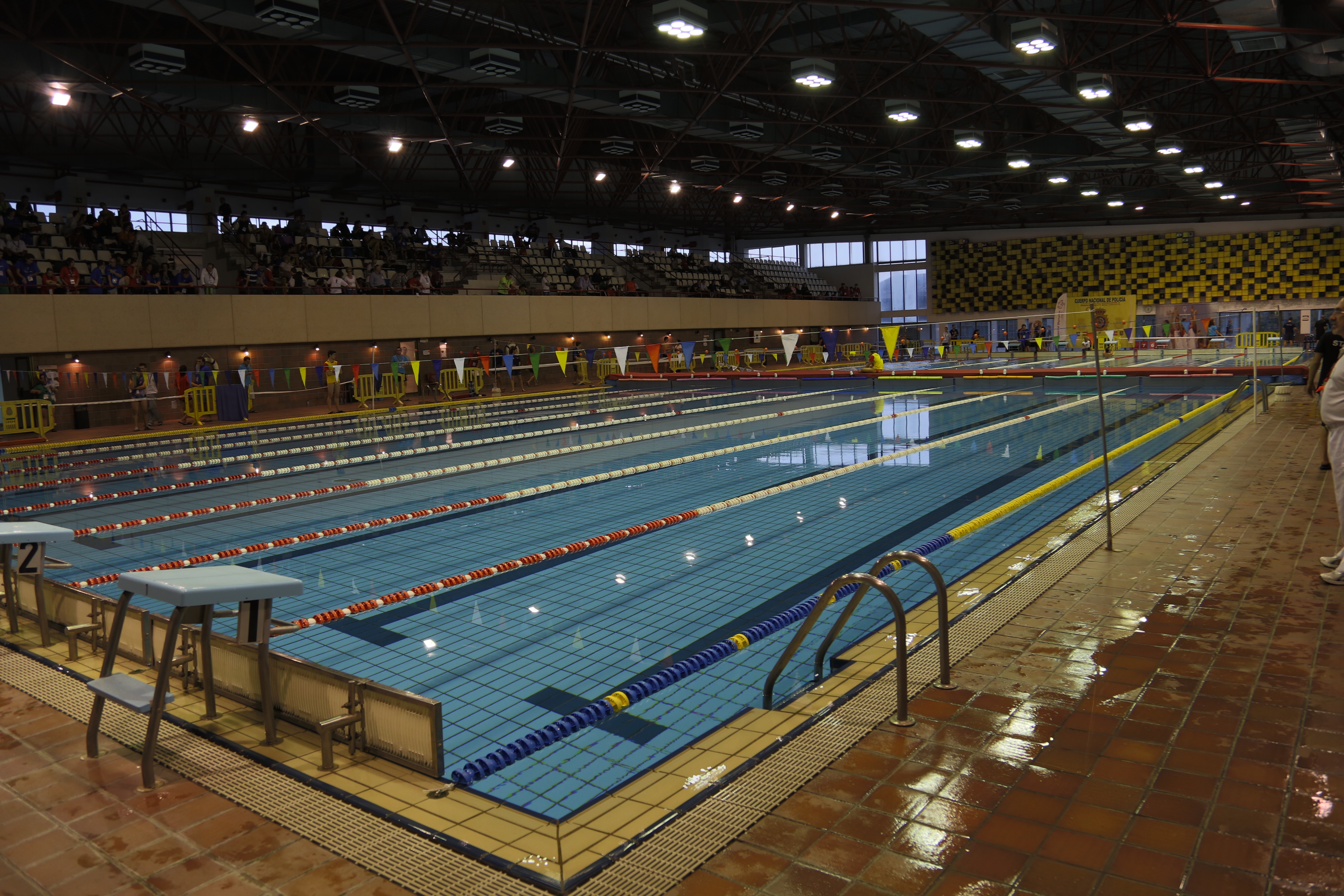 Piscina interior